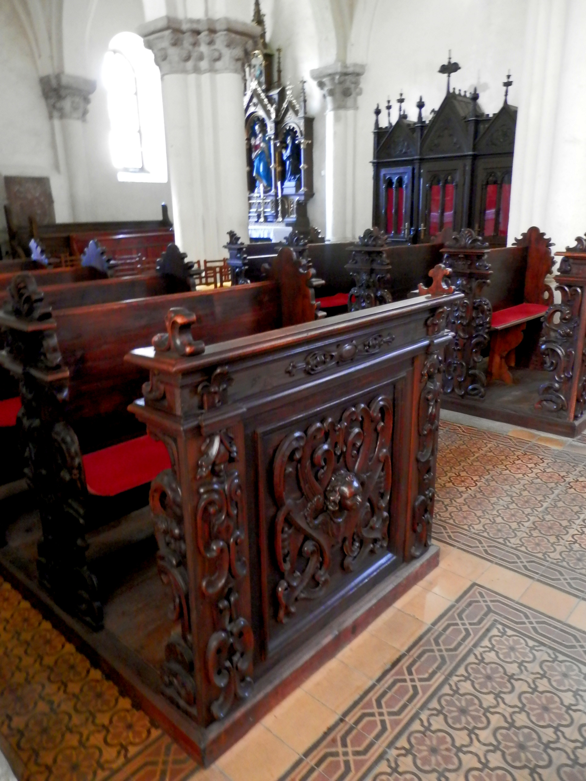 Interiér. Katedrála svätého Martina, Spišská Kapitula - Spišské Podhradie. Založená v roku 1200. Okres Levoča.